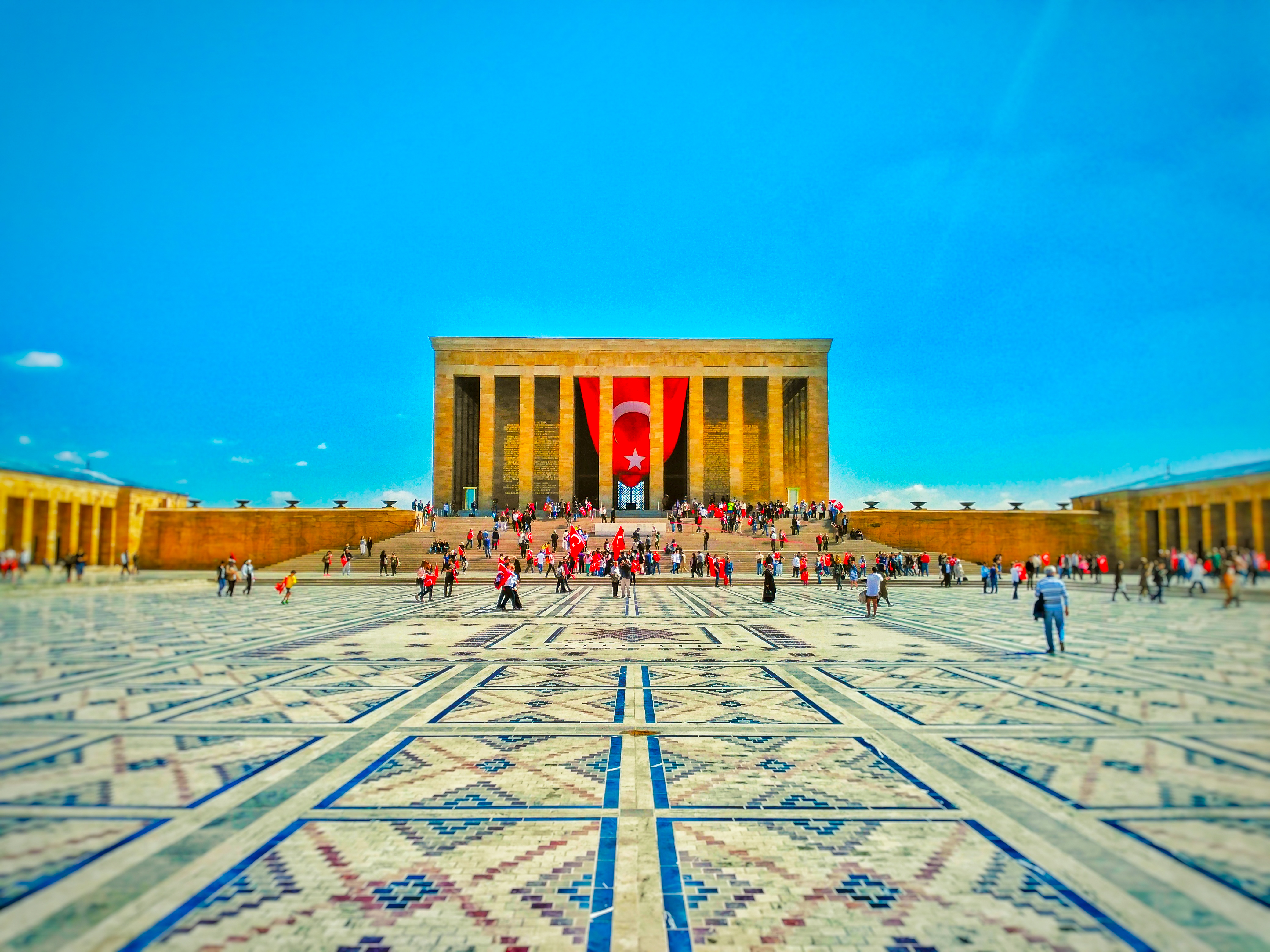 Anıtkabir ziyareti sırasında